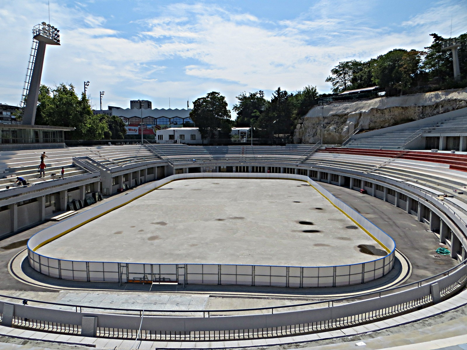 Stadion na Tašmajdanu